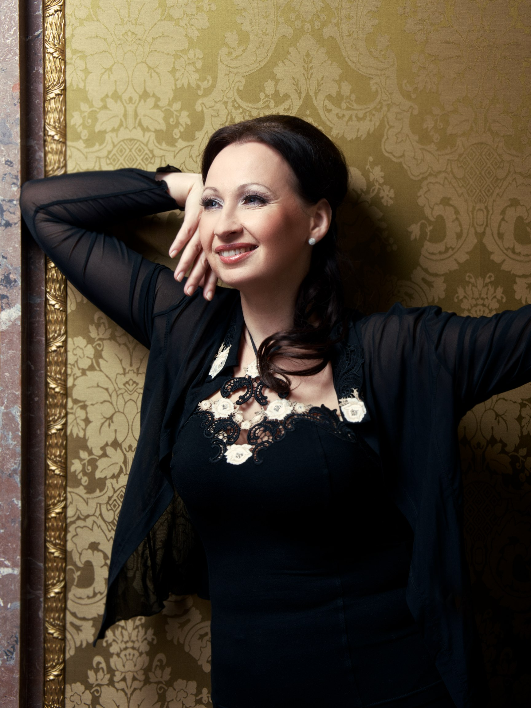 Dana Burešová, česká operní pěvkyně-sopranistka, sólistka Opery Národního divadla.